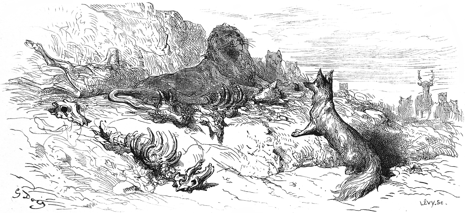 grafika z książki PL Bajki, Jean de La Fontaine, nakładem i drukiem Jana Noskowskiego, Warszawa 1876